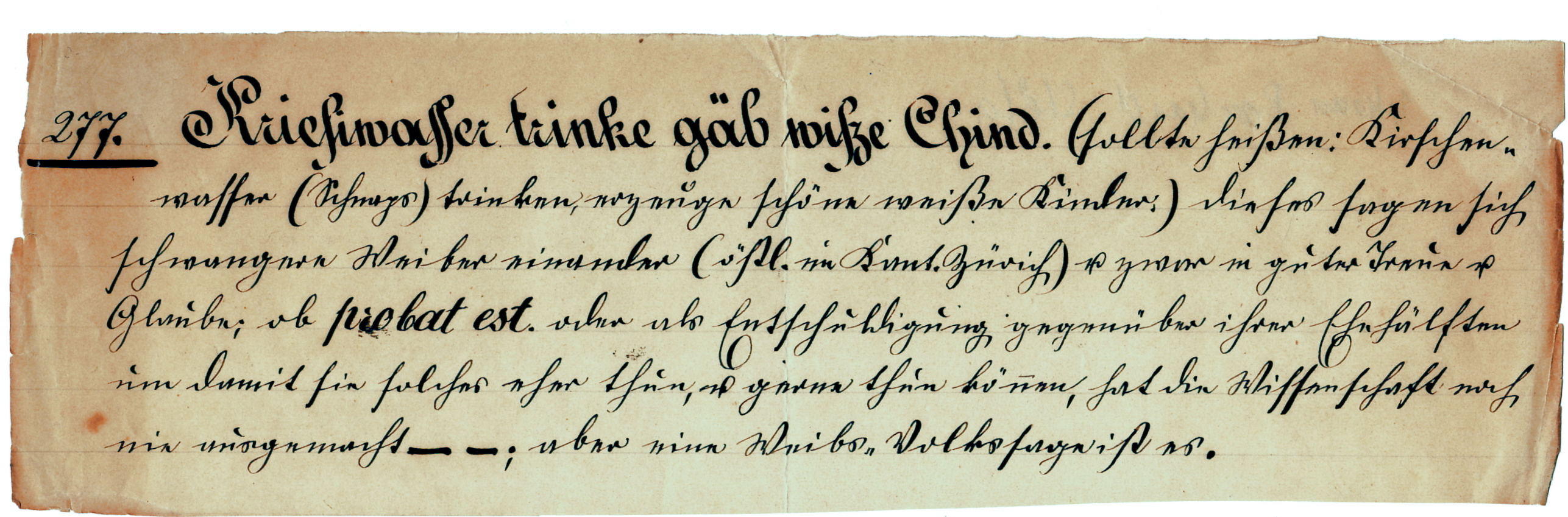 Belegzettel des Schweizerischen Idiotikons: Einsendung von Joh. Bosshard aus Pfäffikon ZH, Mitte des 19. Jahrhunderts